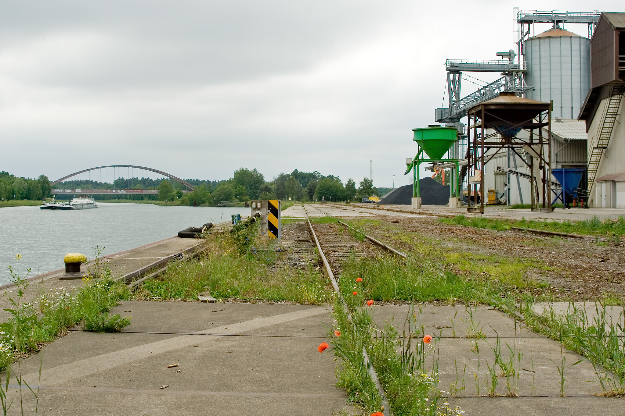 Gleise der Hafenbahn im Uelzener Hafen. Im Hintergrund die Eisenbahnbrücke der Bahnstrecke Uelzen–Dannenberg über den Elbe-Seitenkanal. Getreidesilo